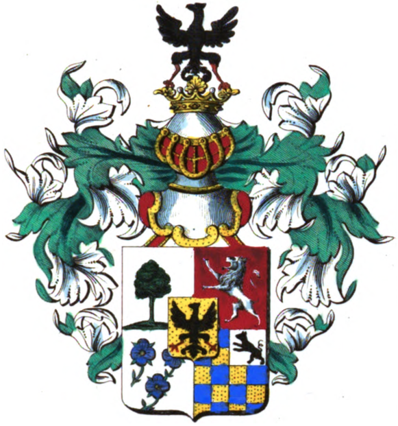 Armoiries de la famille de Rossius